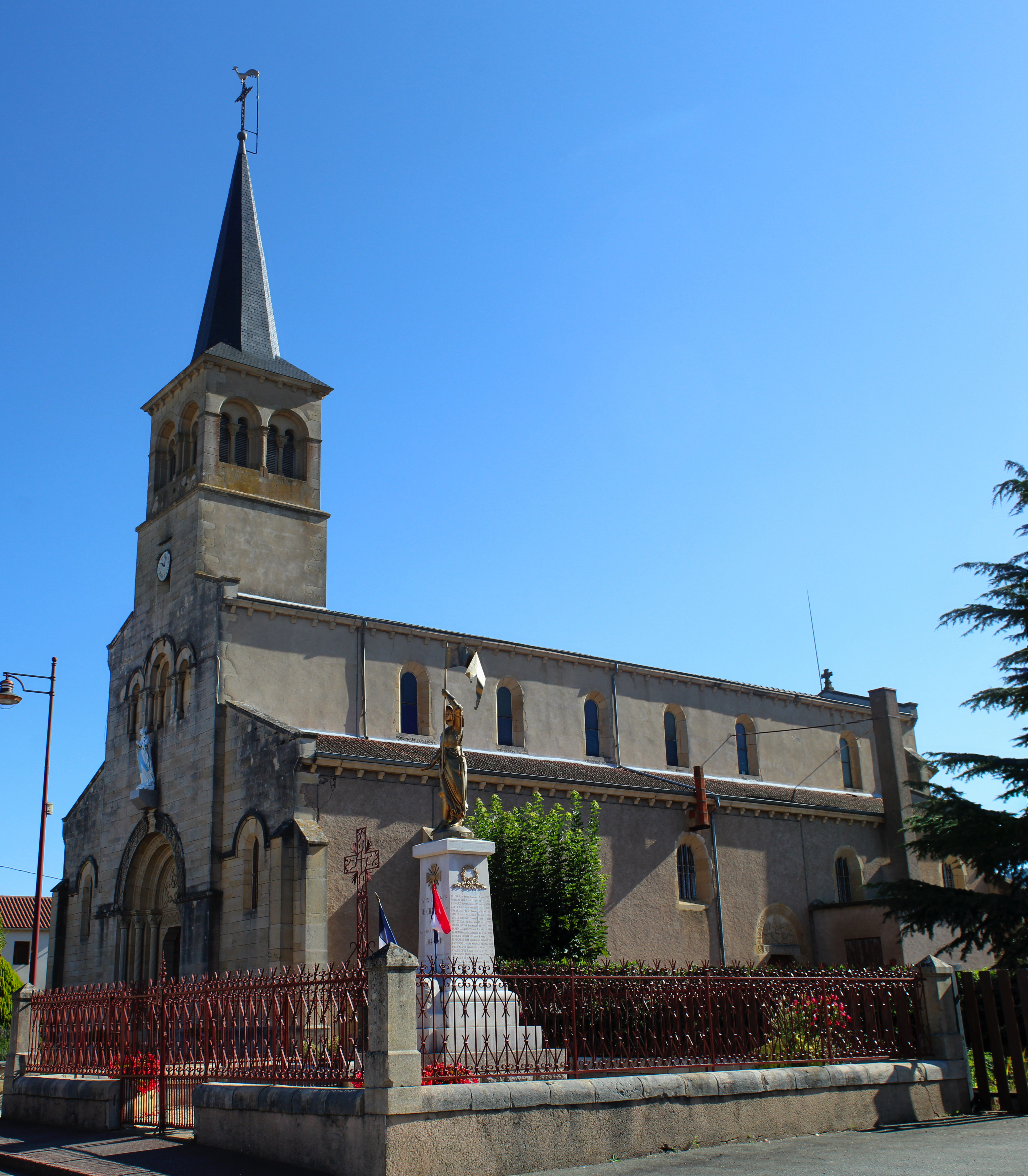 Église Saint-Symphorien de Chassigny-sous-Dun.